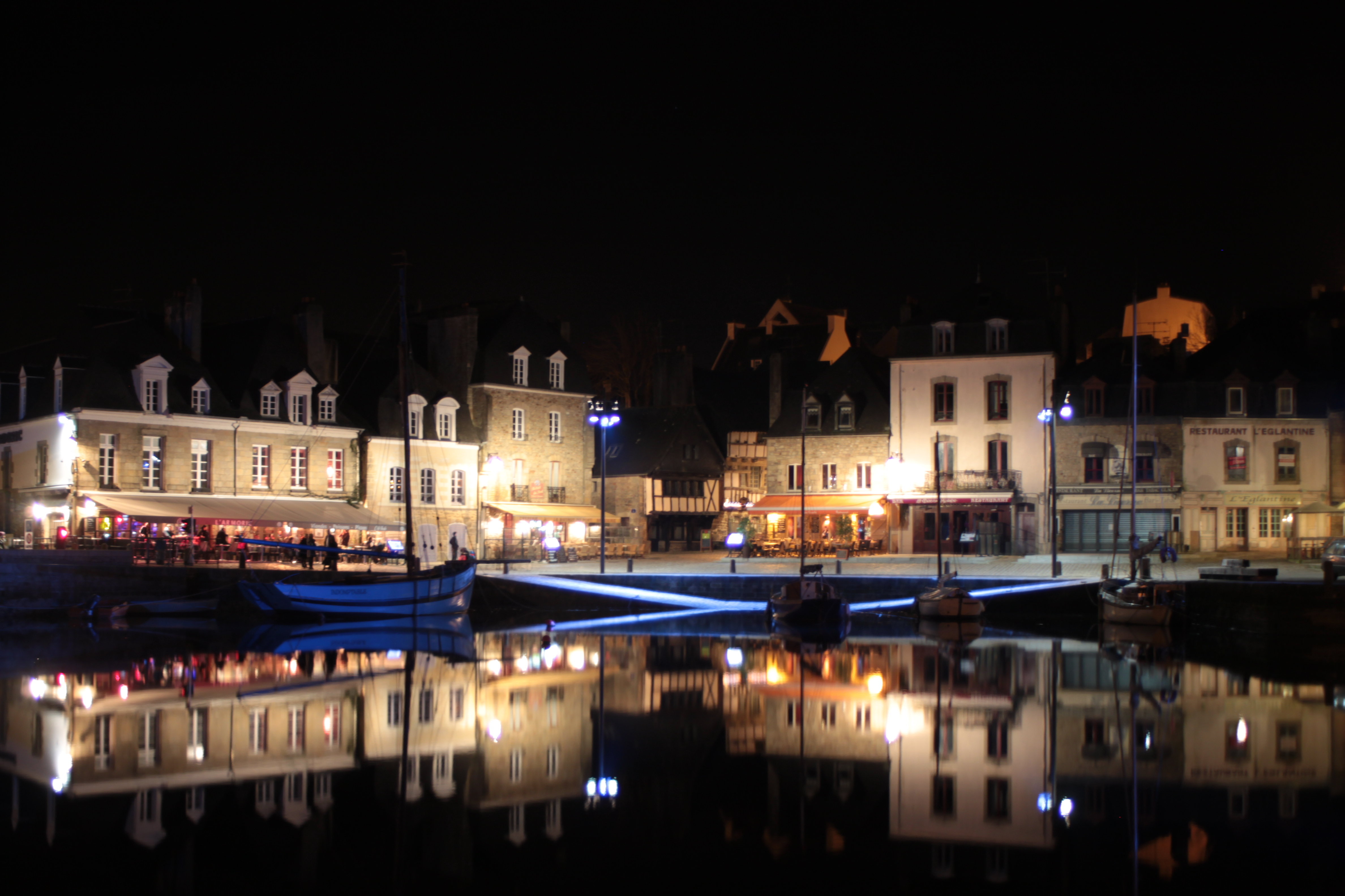 Port Saint-Goustan, Fr-56-Auray.